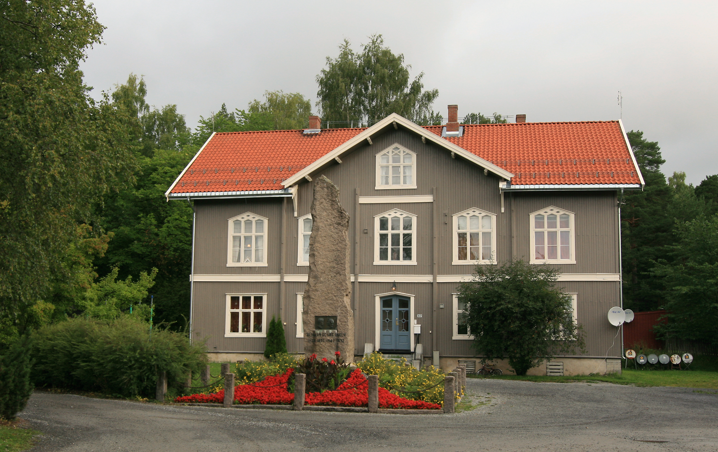 Sagatun folkehøgskole, Hamar. Bygd 1864. Arkitekt: Emil Victor Langlet